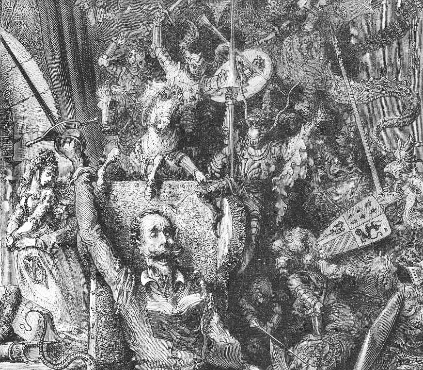 Gustave Dore, Illustration aus Don Quixote; (Ausgabe von 1880 hg. v. J. W. Clark)